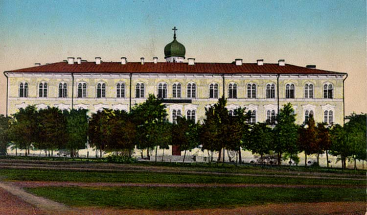 Кам'янець-Подільська чоловіча гімназія. Поштова листівка